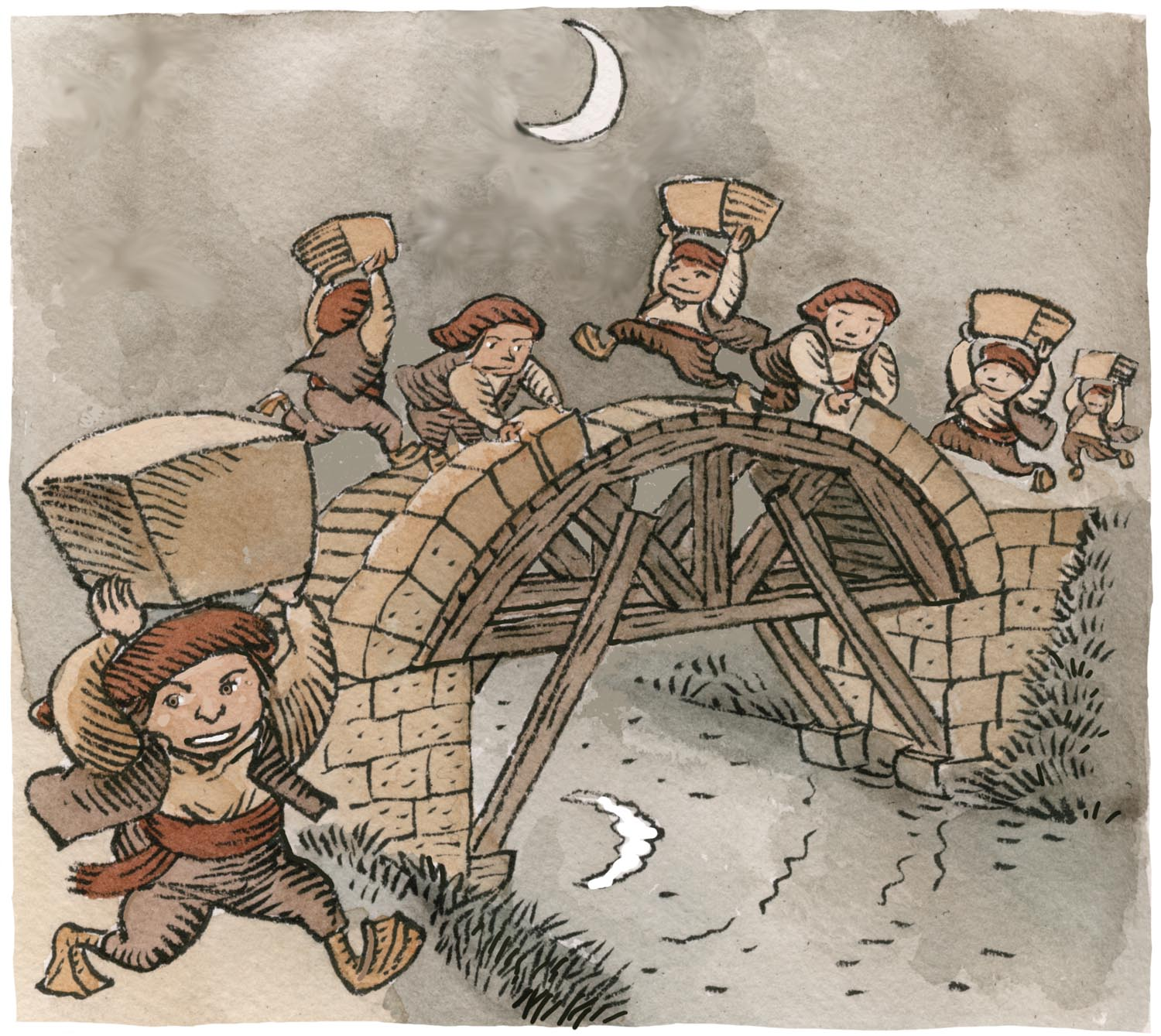 Les Laminak, bâtisseurs de ponts dans la mythologie basque